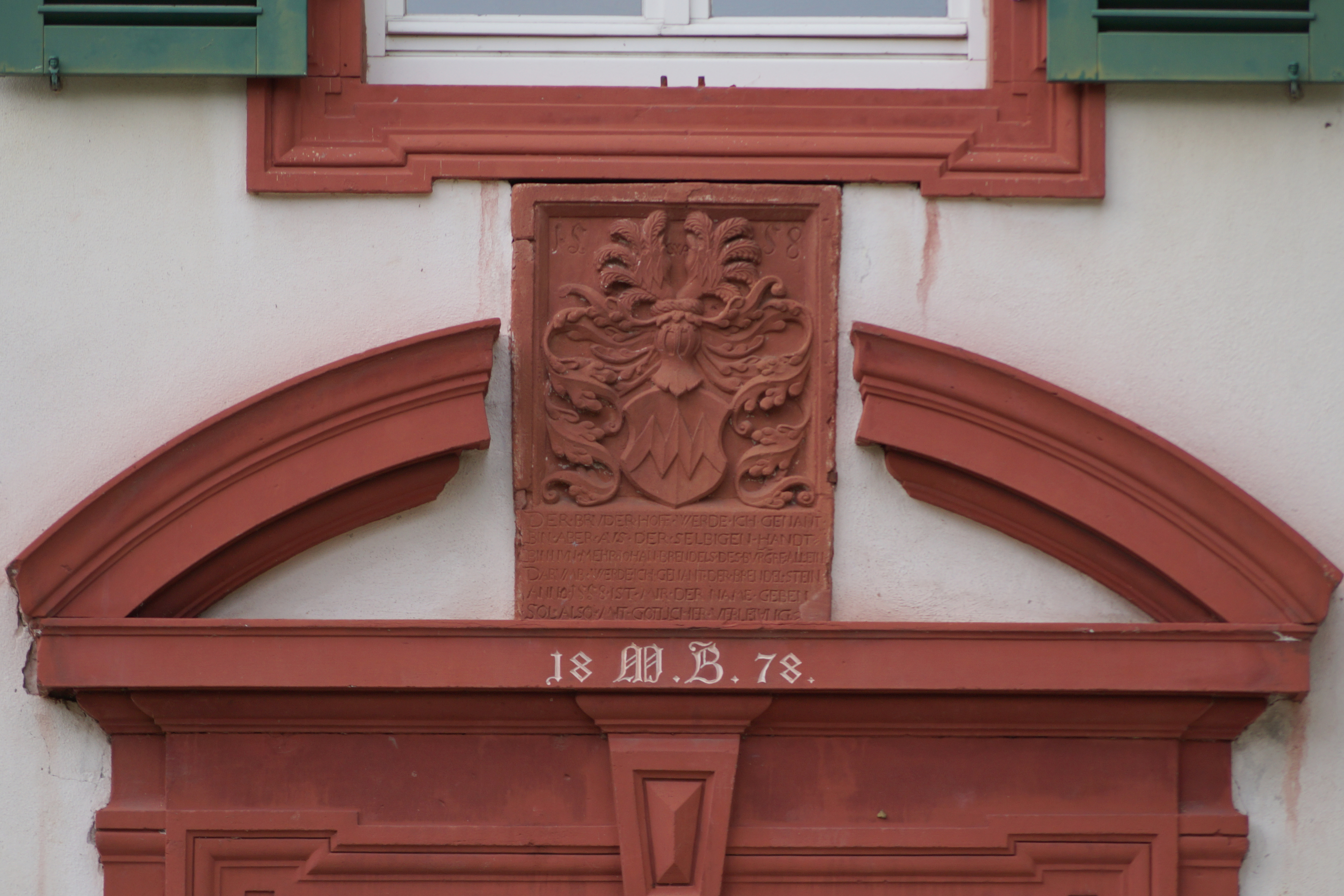 Wappenstein des Friedberger Burggrafen Johann Brendel von Homburg von 1558 am Ostflügel des Alten Schloss Büdesheim, Main Kinzig-Kreis, Hessen. Der Stein wurde 1878 in einem Sprenggiebel wiederverwendet. Die unterste Zeile lässt sich nur aus großer Entfernung bei Aufnahme mit einem Teleobjektiv lesen.